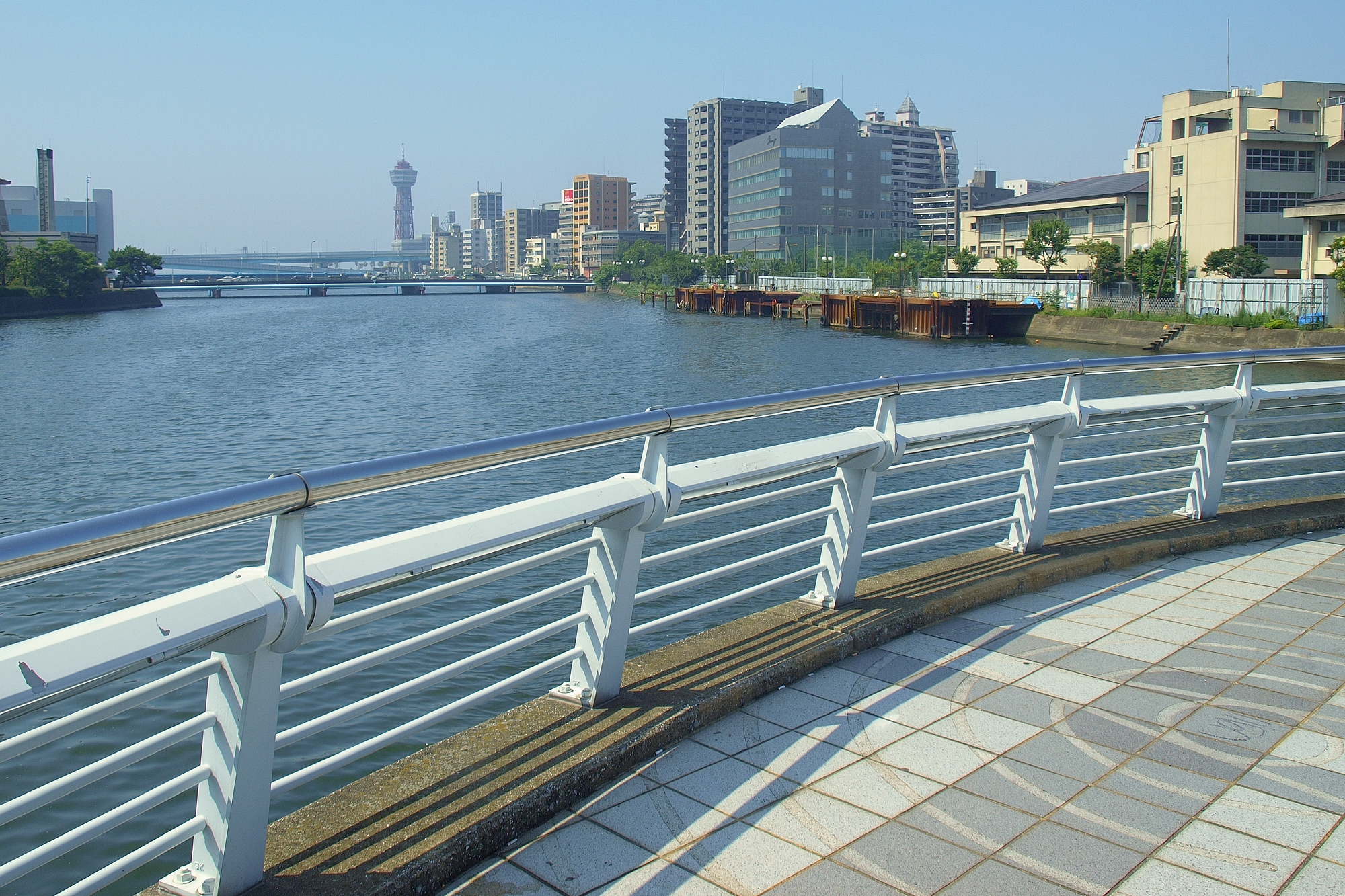 福岡県を流れる那珂川。須崎橋より河口付近を望む。